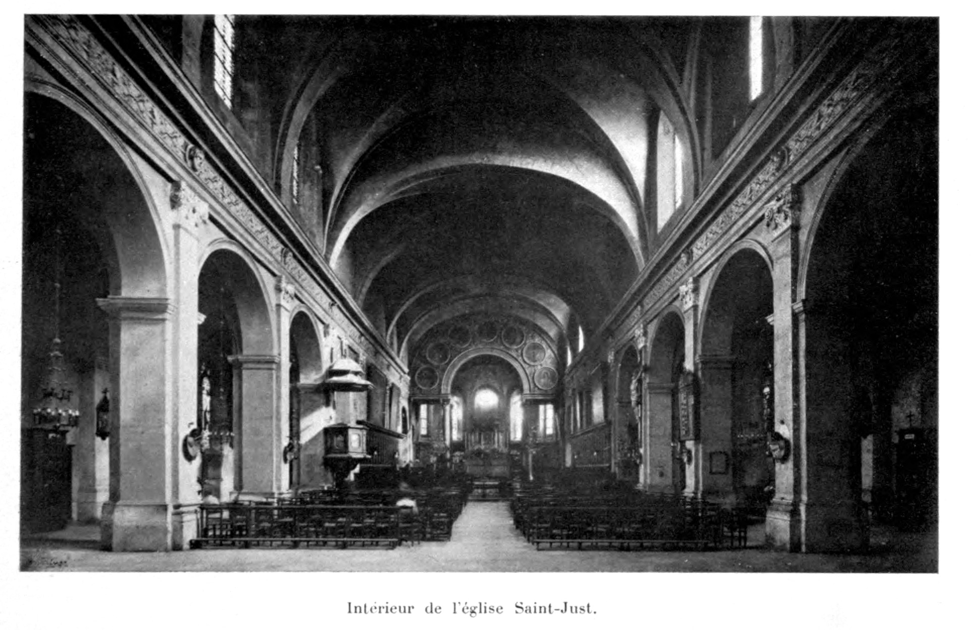 Illustration pour l'Histoire des églises et chapelles de Lyon